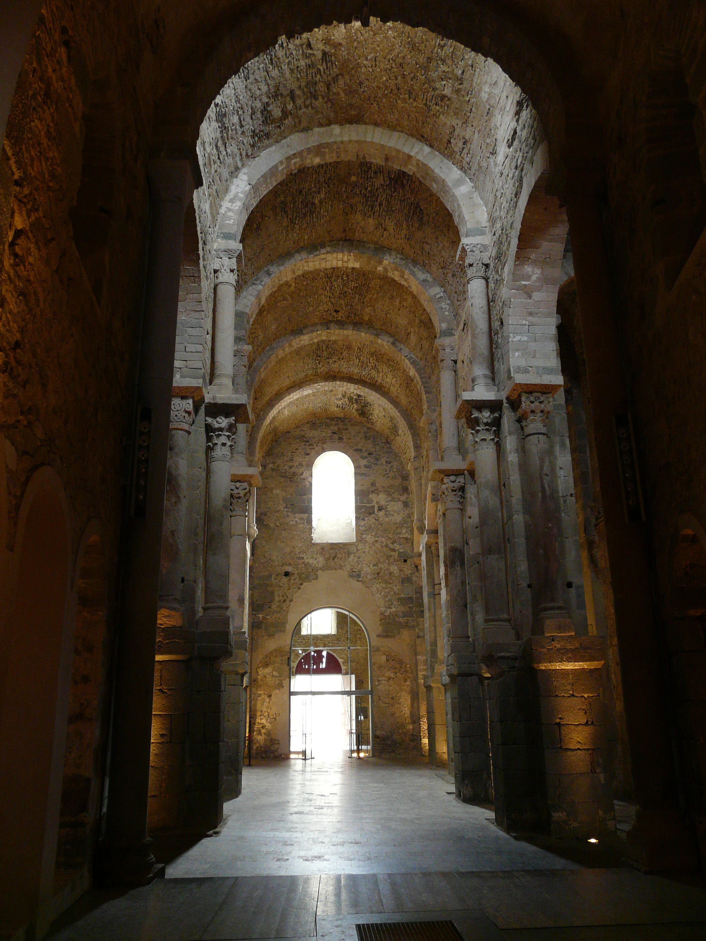 Monestir de Sant Pere de Rodes (el Port de la Selva) Object location42° 19′ 23.85″ N, 3° 09′ 58.46″ E